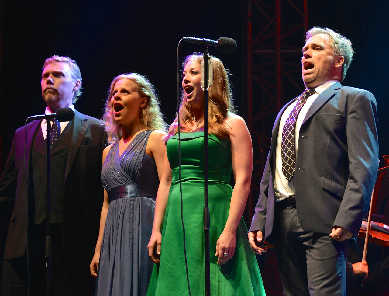 Karl-Magnus Fredriksson, Sara Widén, Magdalena Risberg och Klas Hedlund på en konsert på Gustav Adolfs torg under Stockholms Kulturfestival den 17 augusti 2013.